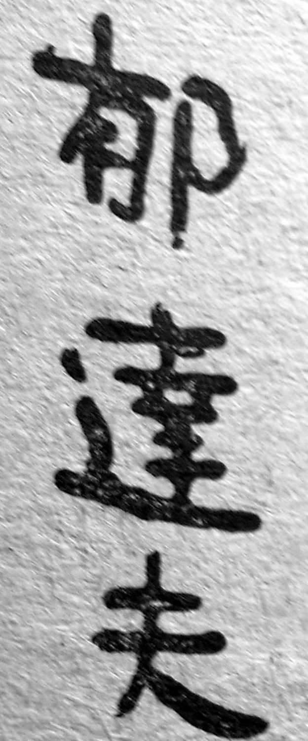 郁达夫签名